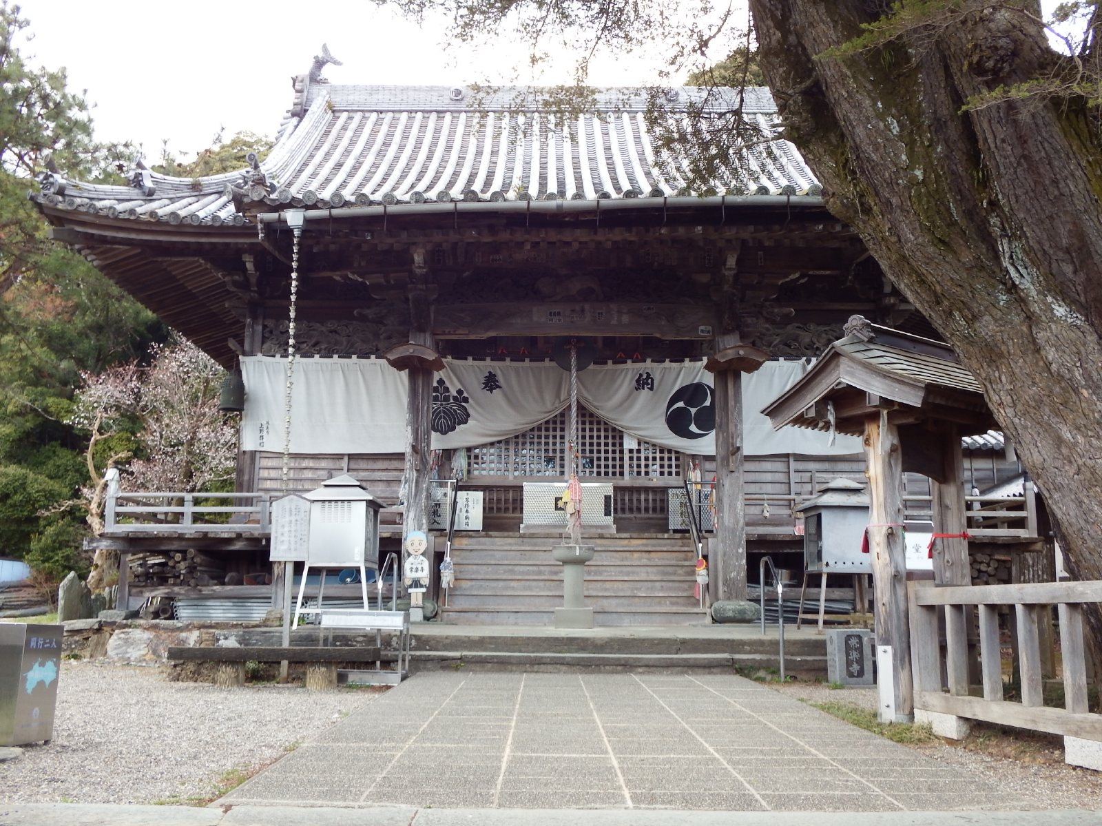 常楽寺の本堂